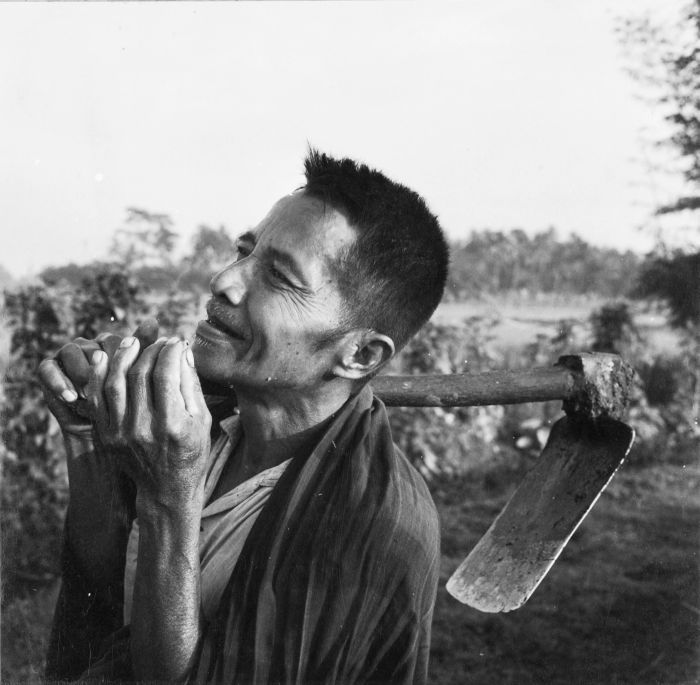 Negatief. Boer met schoffel op de schouder, op weg naar zijn stenenbakkerij op zijn sawah